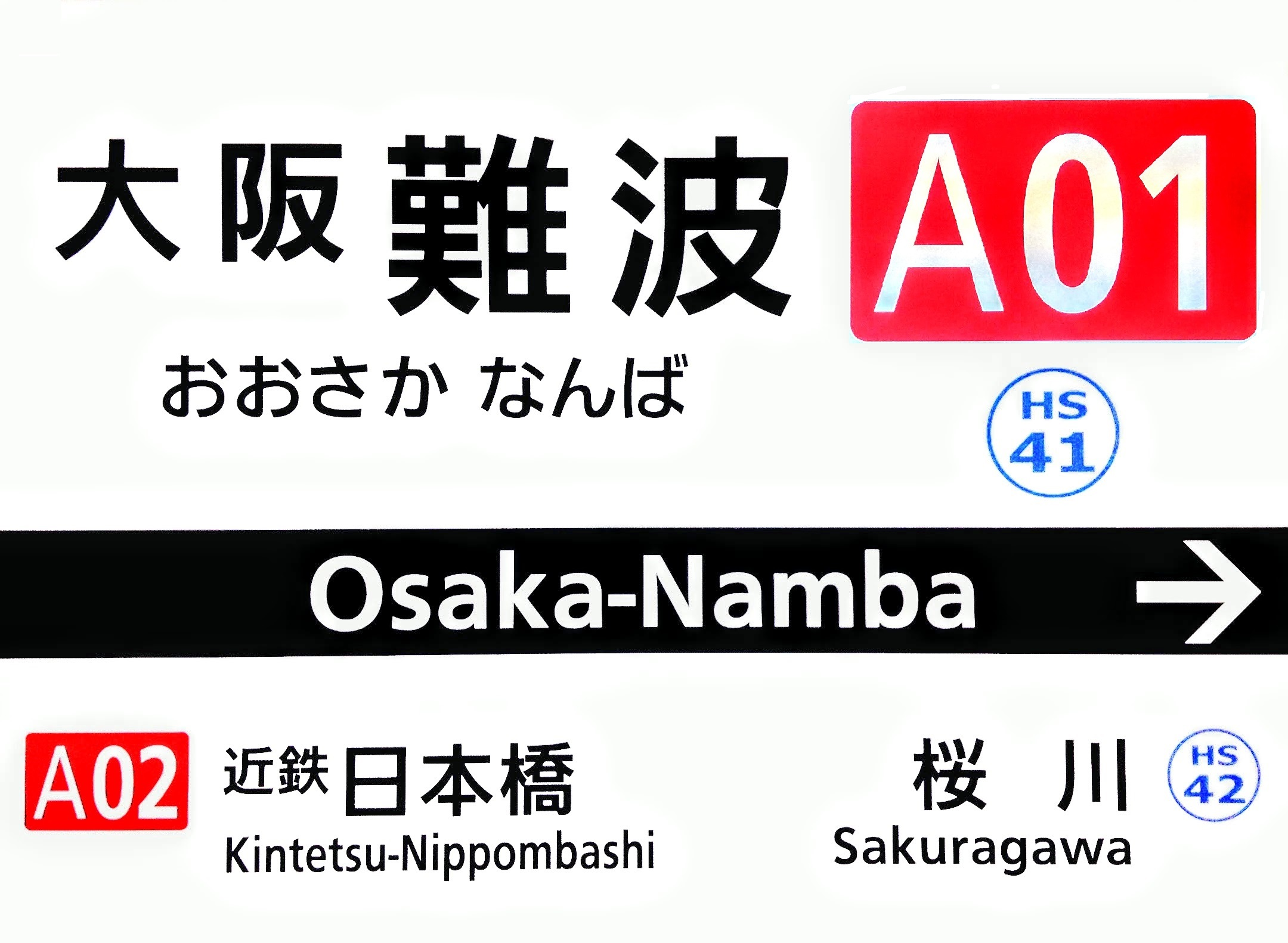 大阪難波駅・駅名標